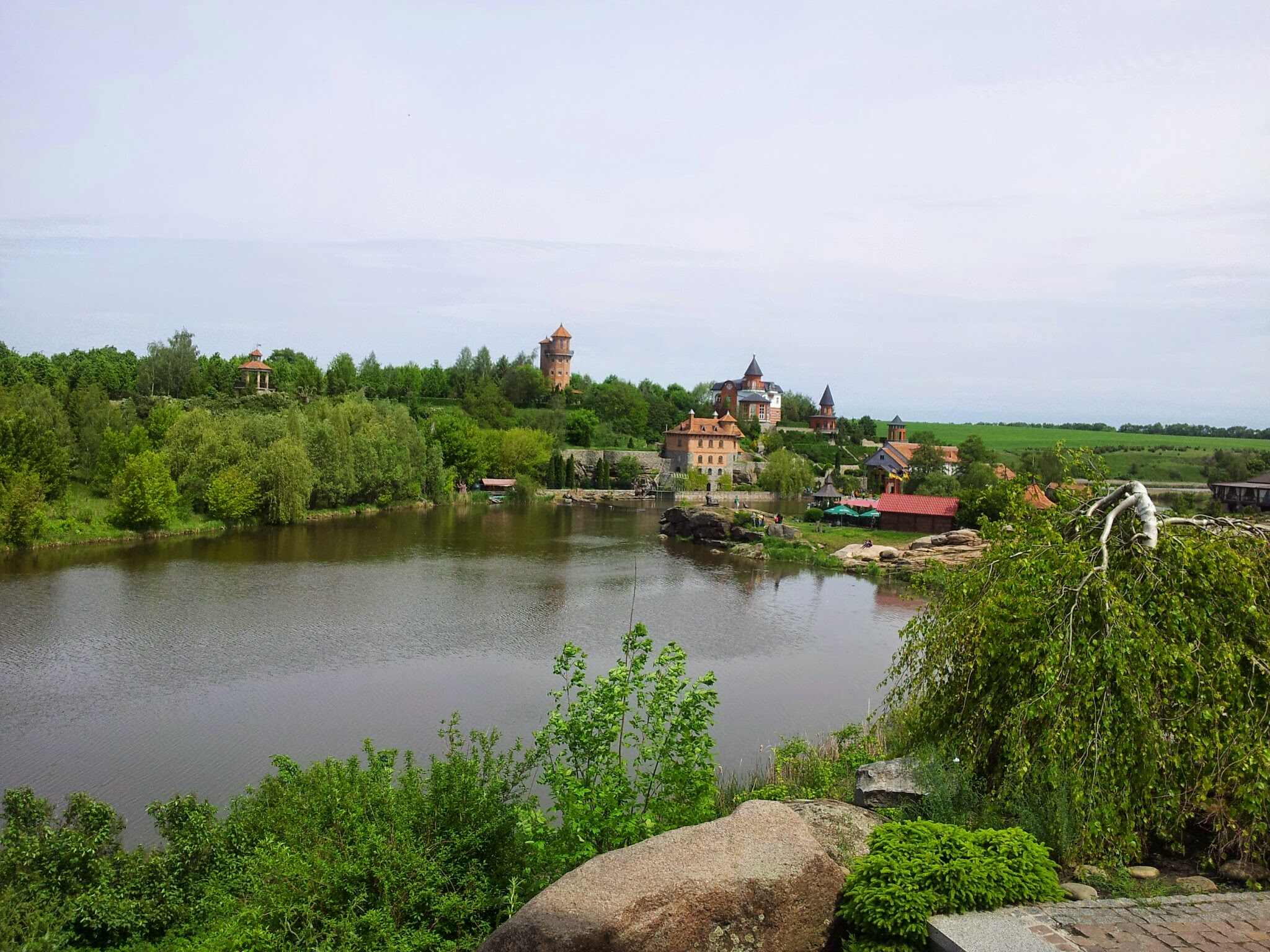 Buky, Kyivs'ka oblast, Ukraine, 09022